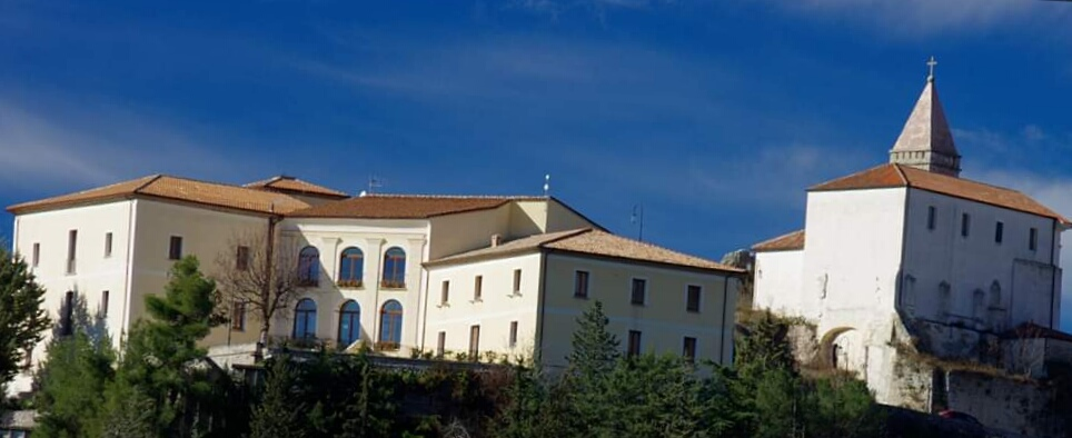 Luogo storico visitato da San Tommaso D'Aquino e sede del Paco nazionale della Val D'Agri, Appennino Lucano e Lagonegrese.